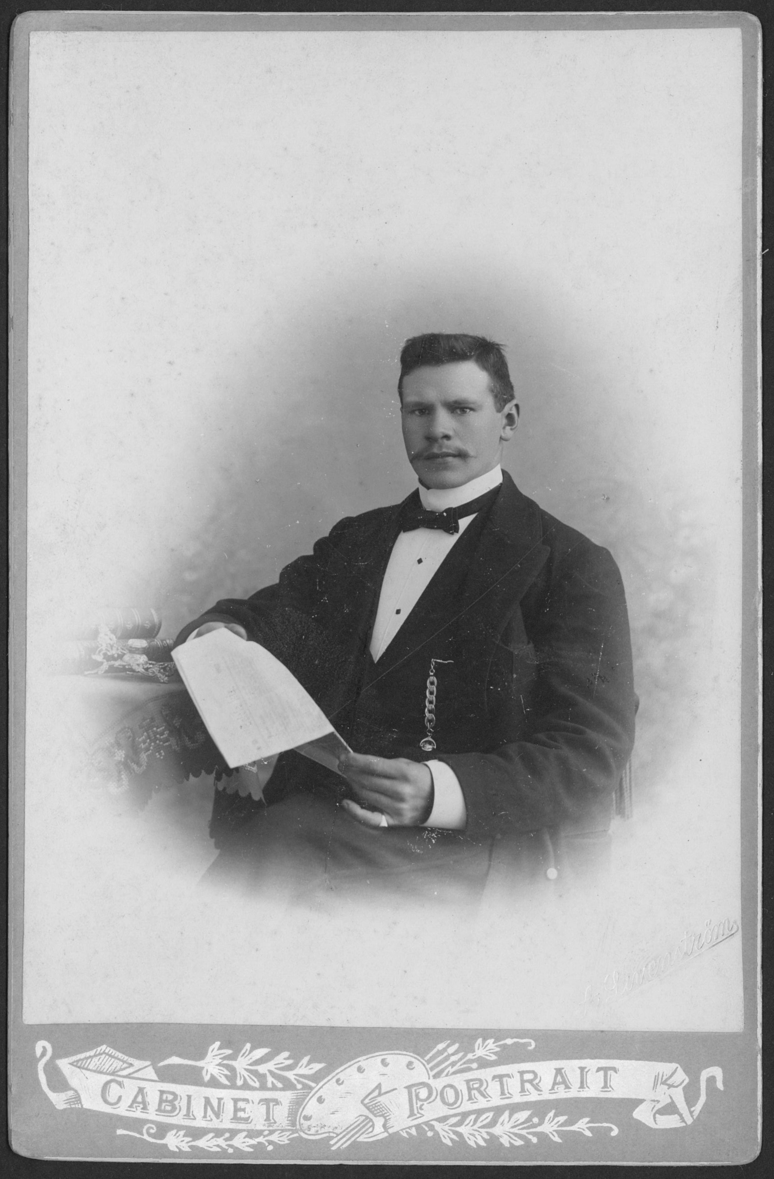 Jakob Neumann Paistu Aidu